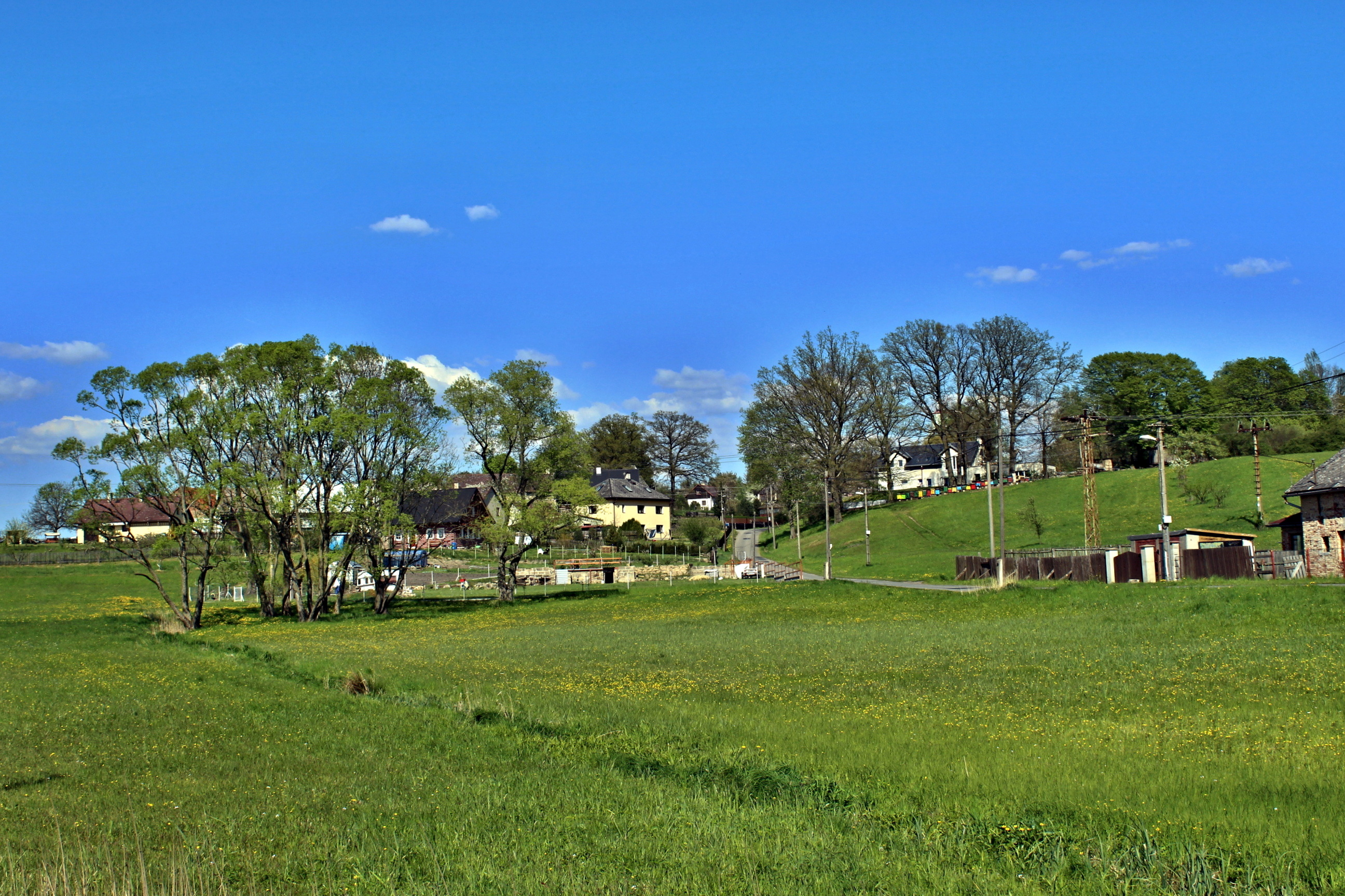 Obec Brenná u Zákup